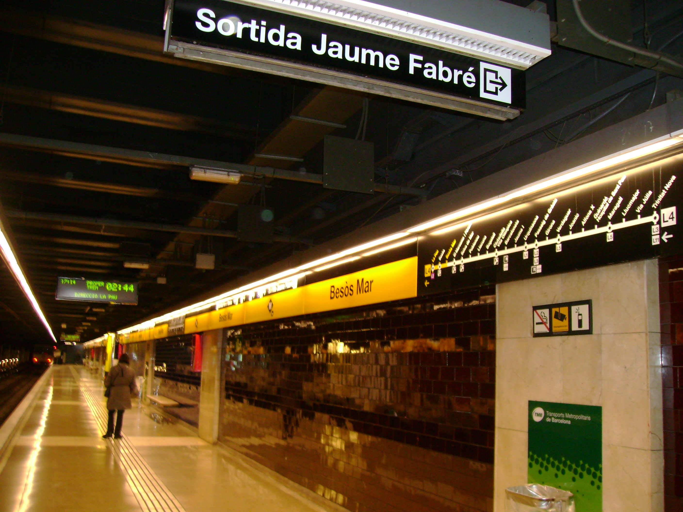 Foto capturada per la meva càmara a l'estació de Besòs Mar (Metro de Barcelona).